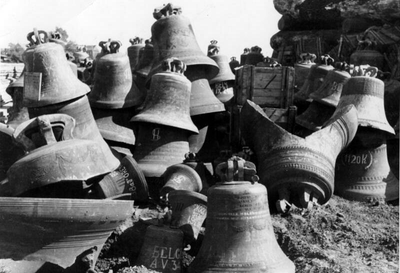 Zentralbild-dpd 1947. Das Glockenlager im Hamburger Freihafen Diese Glocken wurden von den Nazis während des II. Weltkrieges beschlagnahmt um sie einzuschmelzen. Man versucht sie jetzt zu identifizieren und den Kirchen ihr Eigentum zurückzugeben. 544-47